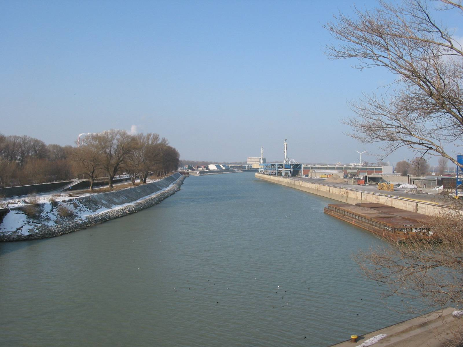 Winterhafen, Vienna II, 2006-01-15 selfmade photo